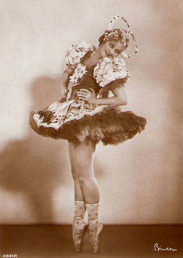 Marianne Winkelstern